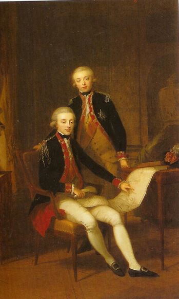 Schilderij van de latere koning Willem I met zijn broertje Frederik omstreeks 1790